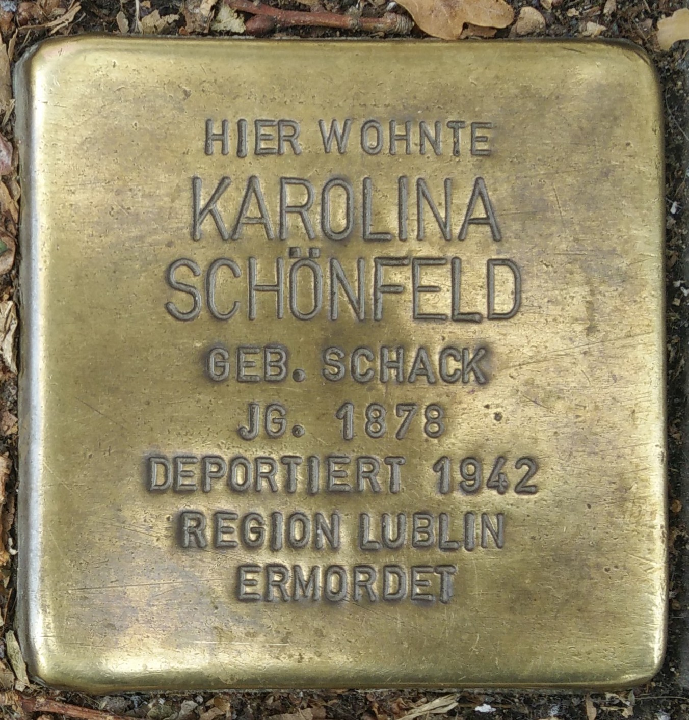 Bad Vilbel, Stolperstein Karolina Schönfeld